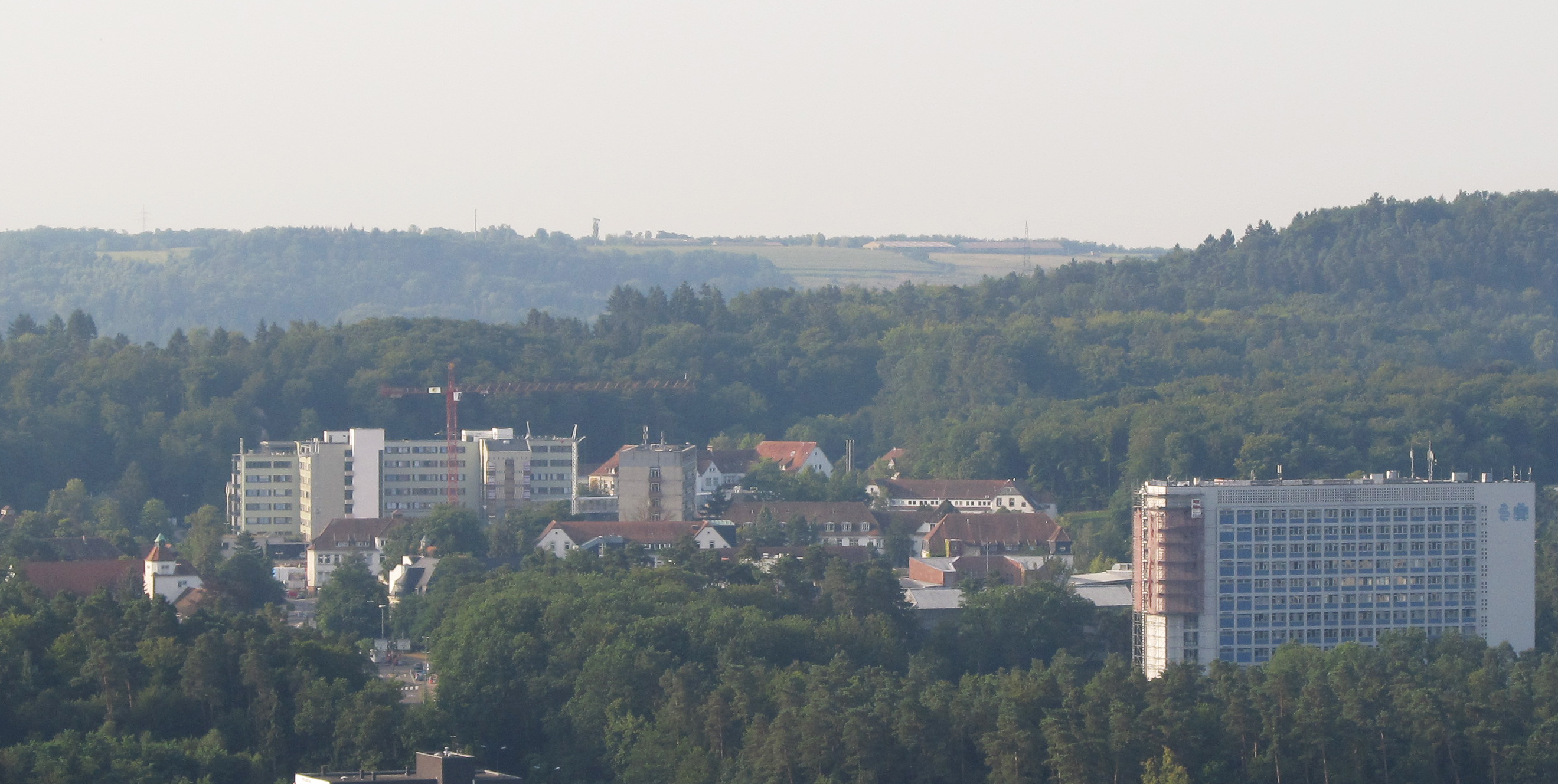 Blick vom Schlossberg auf das Gelände des Universitätsklinikums Homburg, Saarland